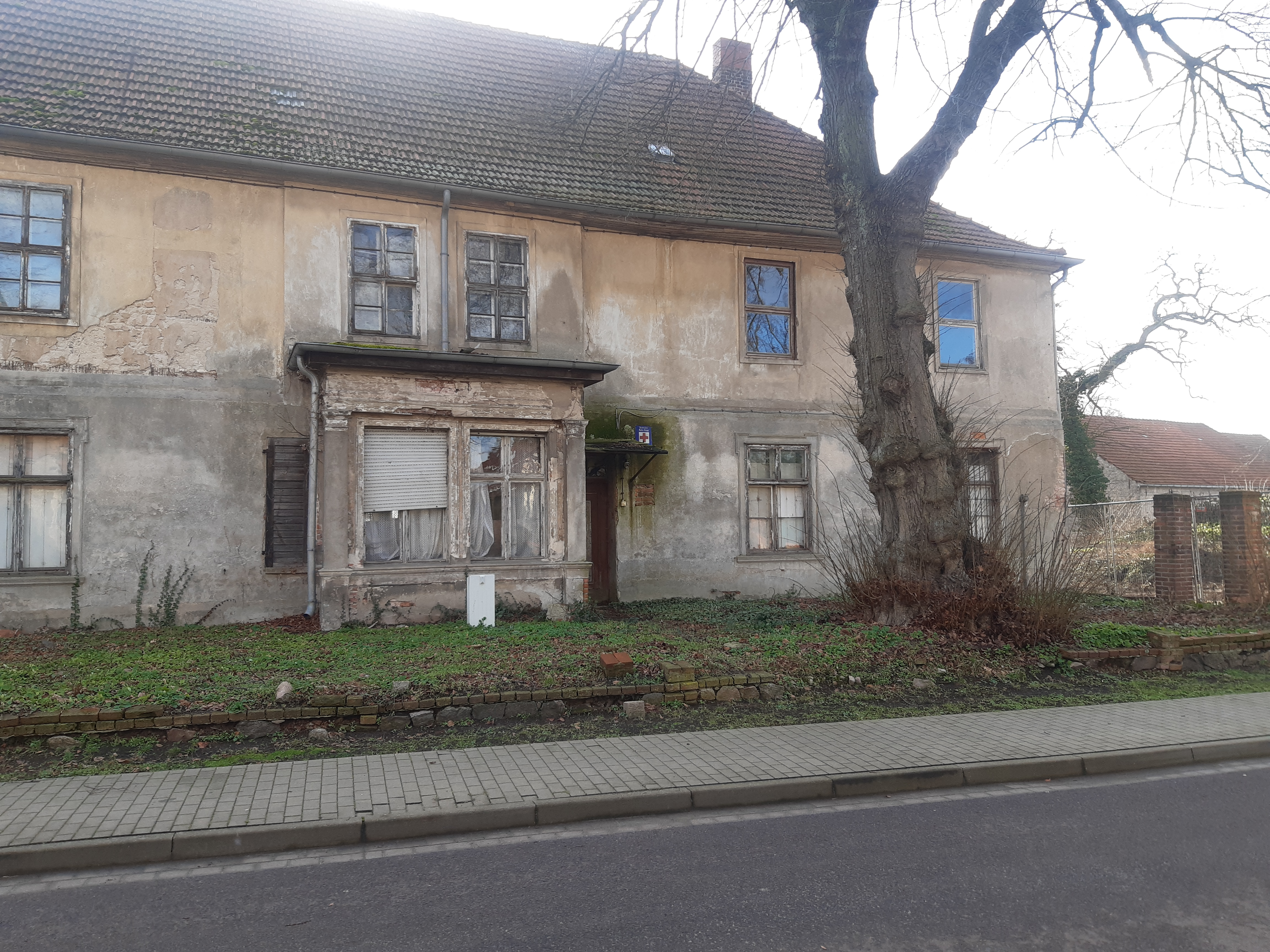 Gutshof